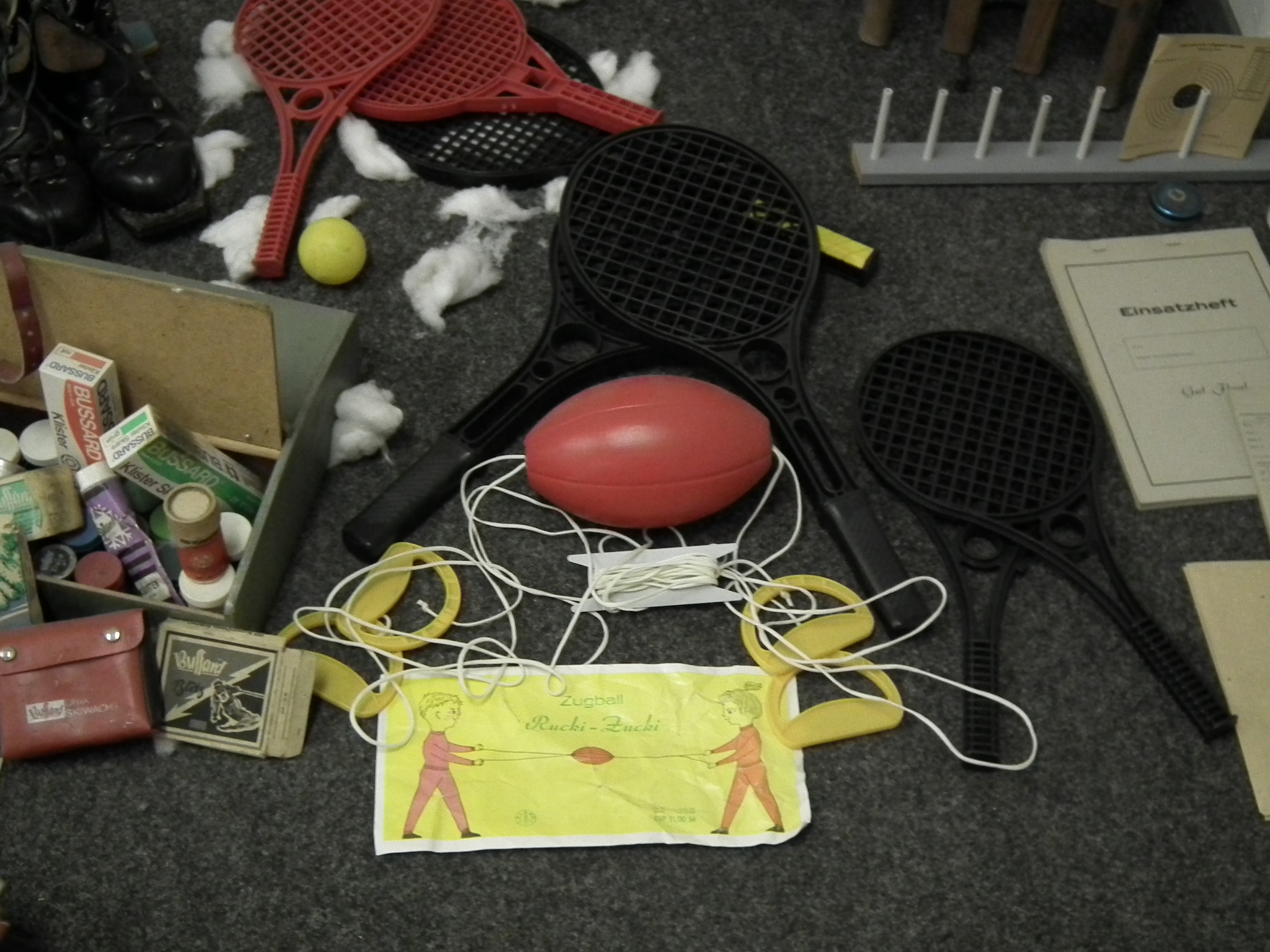 DDR Museum Zeitreise Radebeul, Rucki-Zucki, Fotografiert mit Genehmigung der Museumsleitung